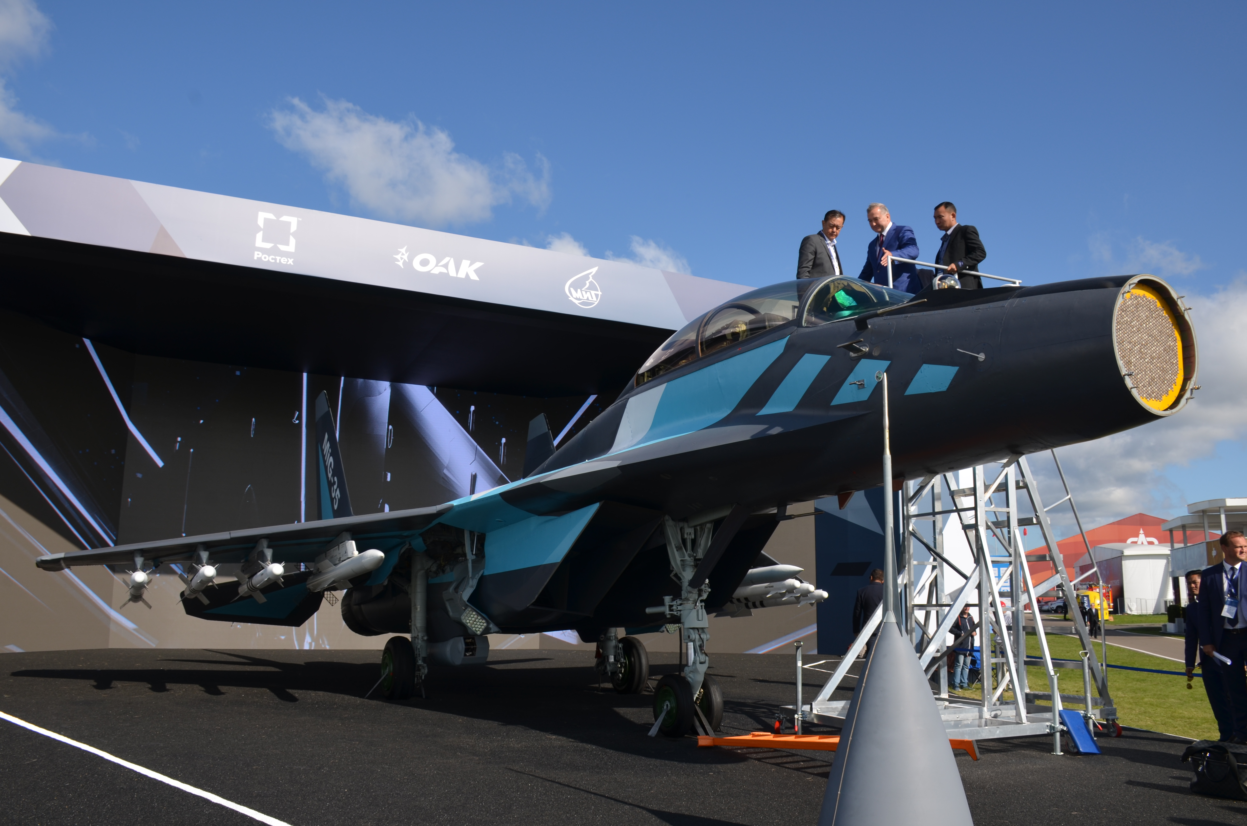 Прототип МиГ-35 на авиасалоне МАКС-2019. Премьера "экспортной модификации". Снятый носовой обтекатель, демонстрируется БРЛС с АФАР.